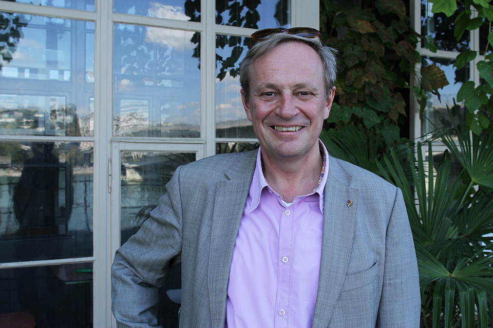 Portrait Florian Vetsch